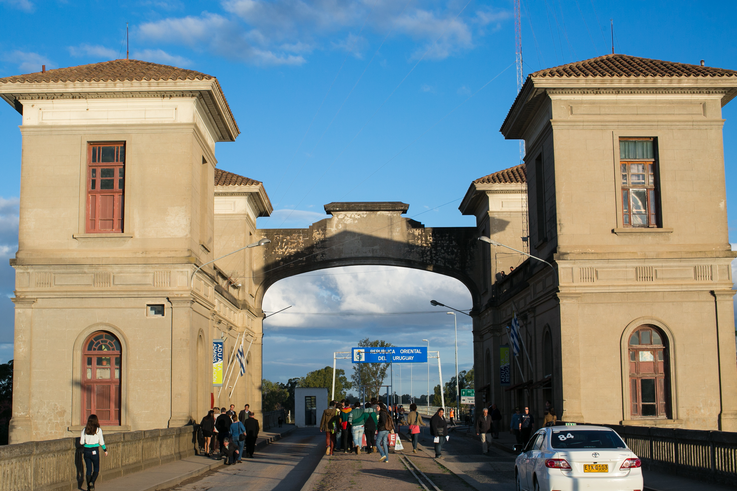 Descerramento da sinalização da Ponte Internacional Barão de Mauá como Patrimônio Cultural do MERCOSUL na cidade de Jaguarão/Brasil e Rio Branco/Uruguai; JAGUARÃO-RS; 30/05/2015; Foto:LiadePaula/MinC